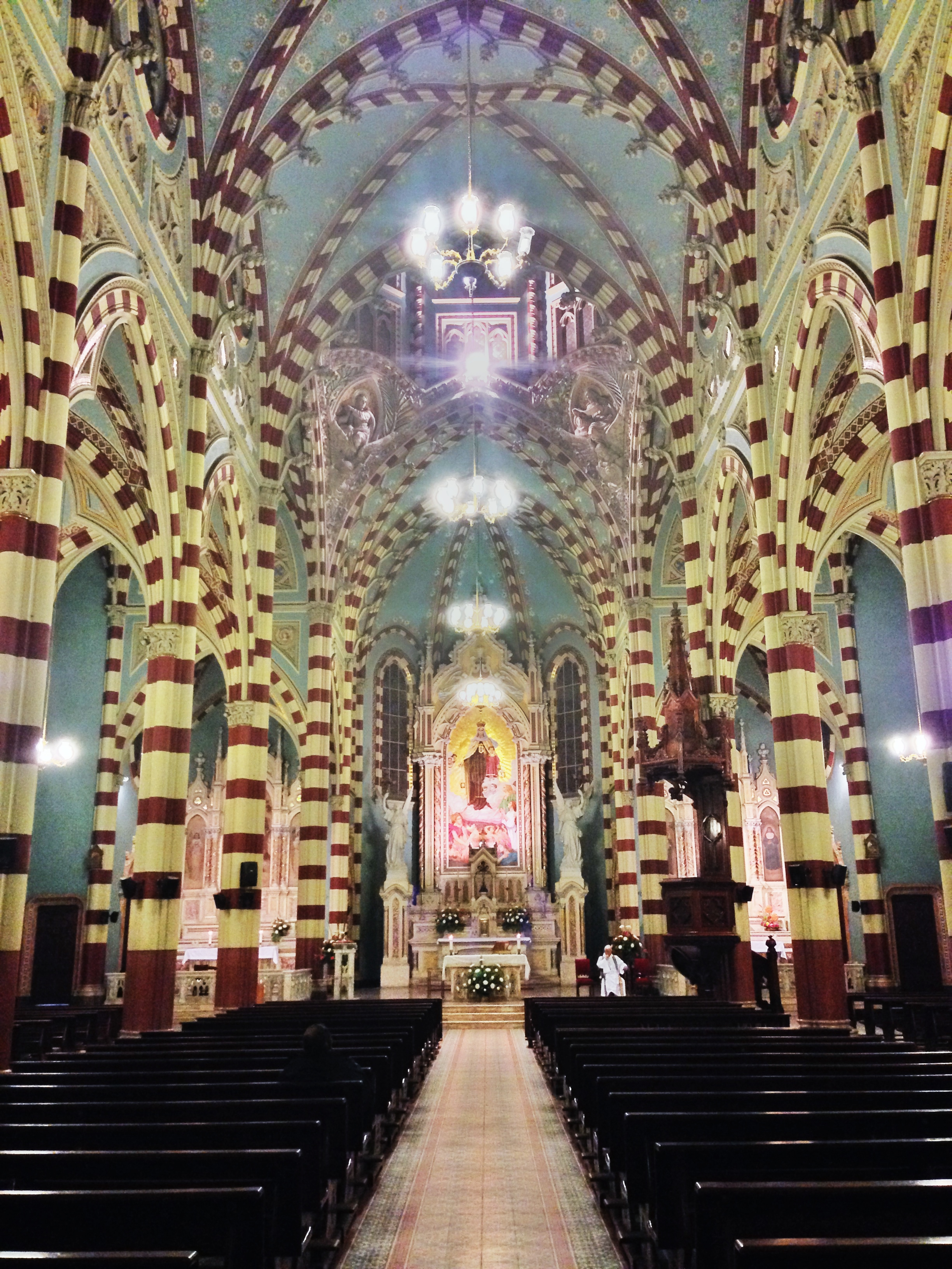 Santuario y Claustro Nacional de Nuestra Señora del Carmen